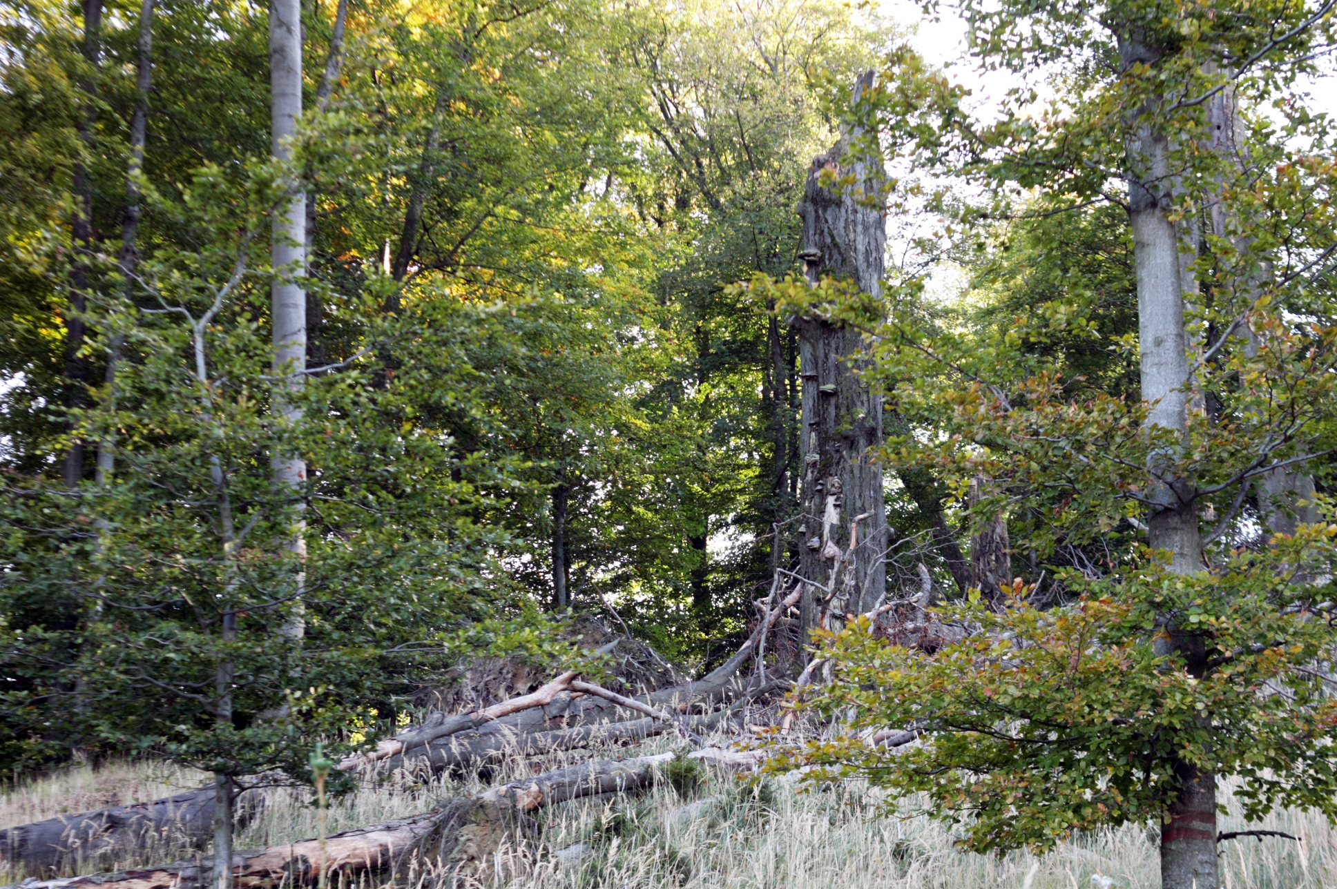 Zbytky kmene poskytují útočiště pro bezobratlé